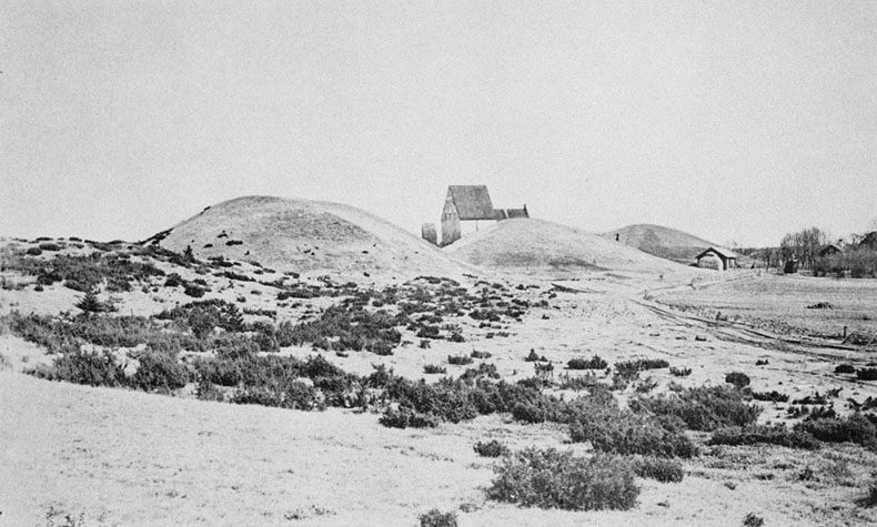 Kungshögarna. Gamla Uppsala kyrka i bakgrunden. Motiv: Gamla Uppsala Nyckelord: Raä-Fastigheter, Riksintressen Kategori: (01) Exteriörer, Hög Kungshögarna. Gamla Uppsala kyrka i bakgrunden.